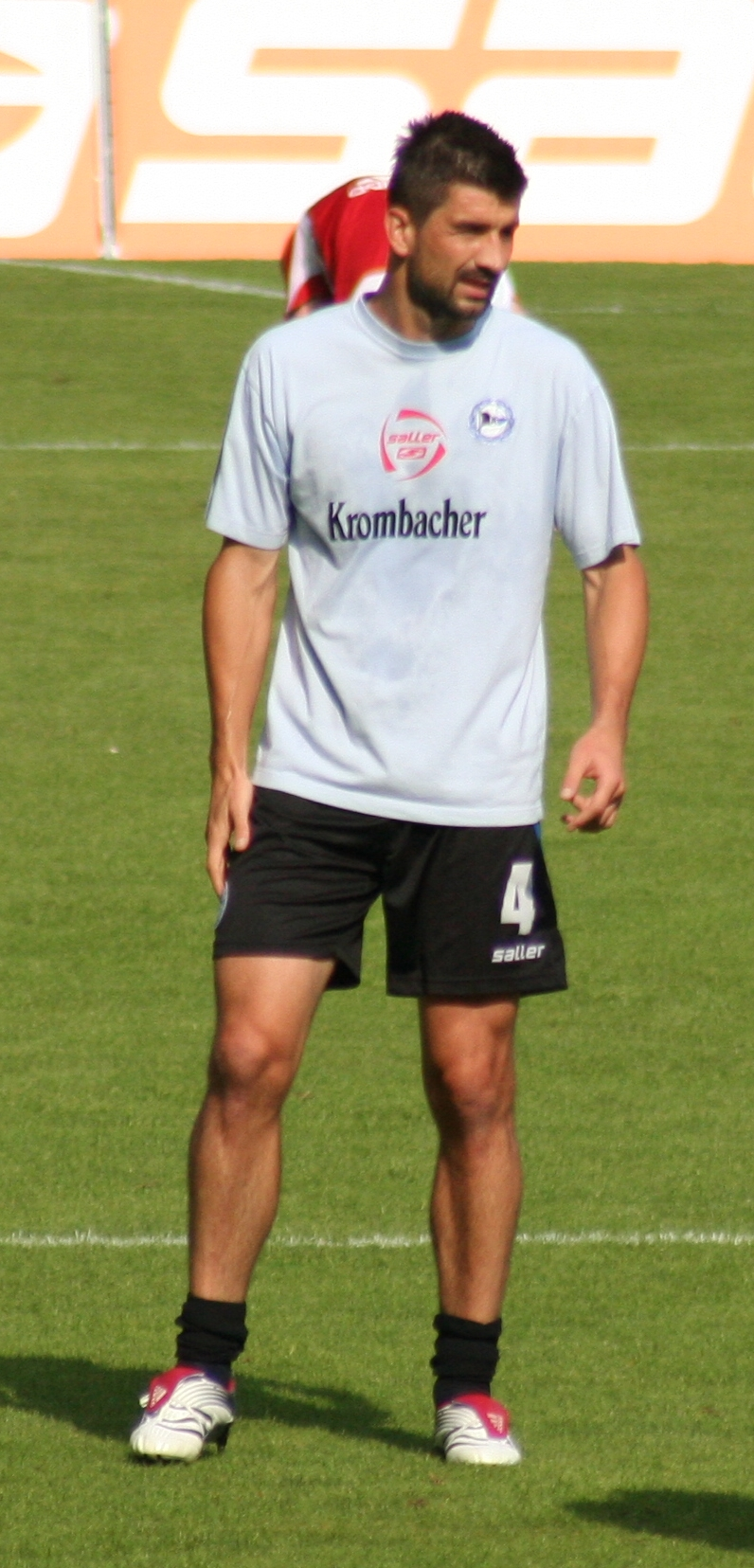 Petr Gabriel